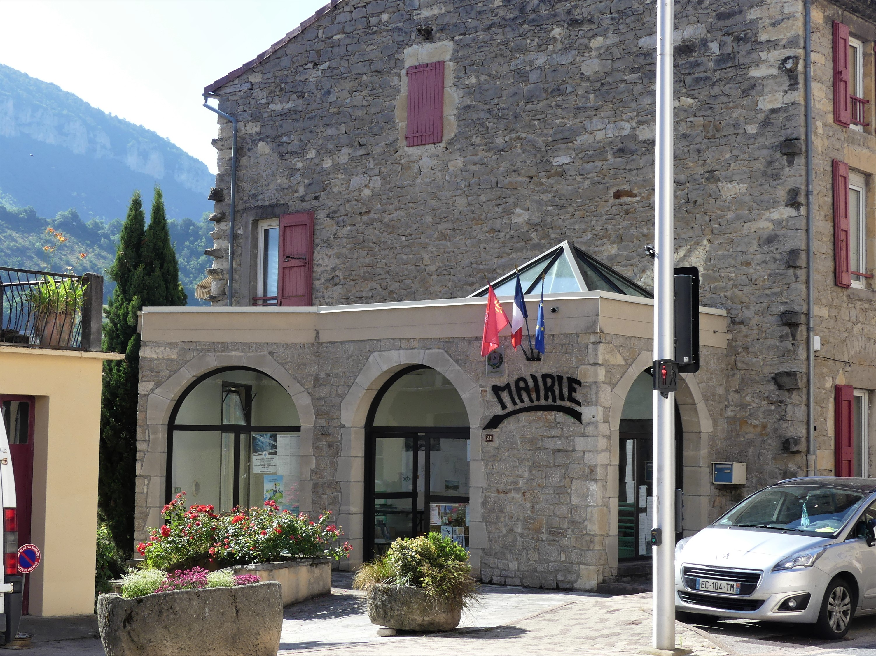 La mairie d'Aguessac, Aveyron, France.